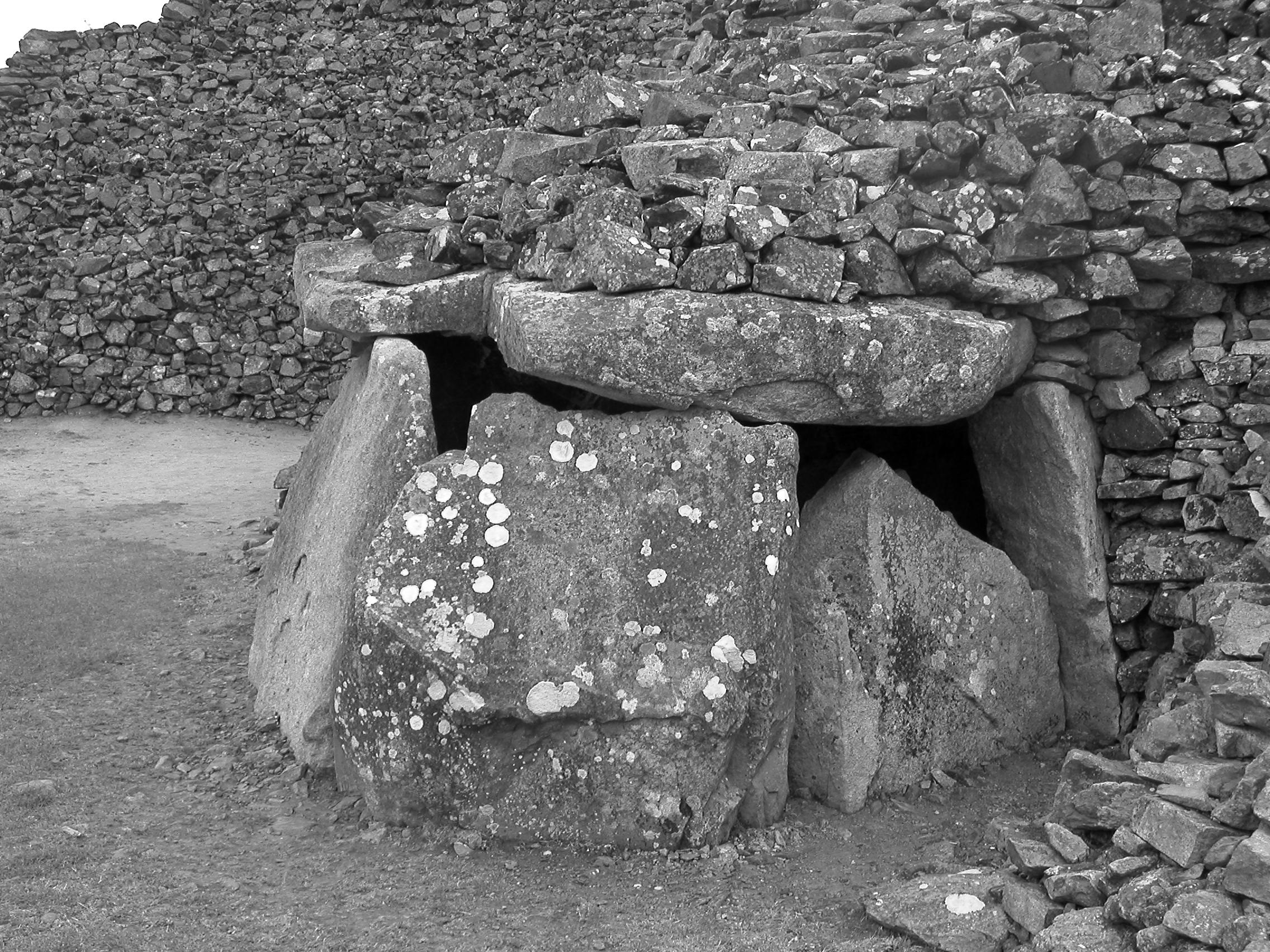 Detail des Tumulus von Barnenez